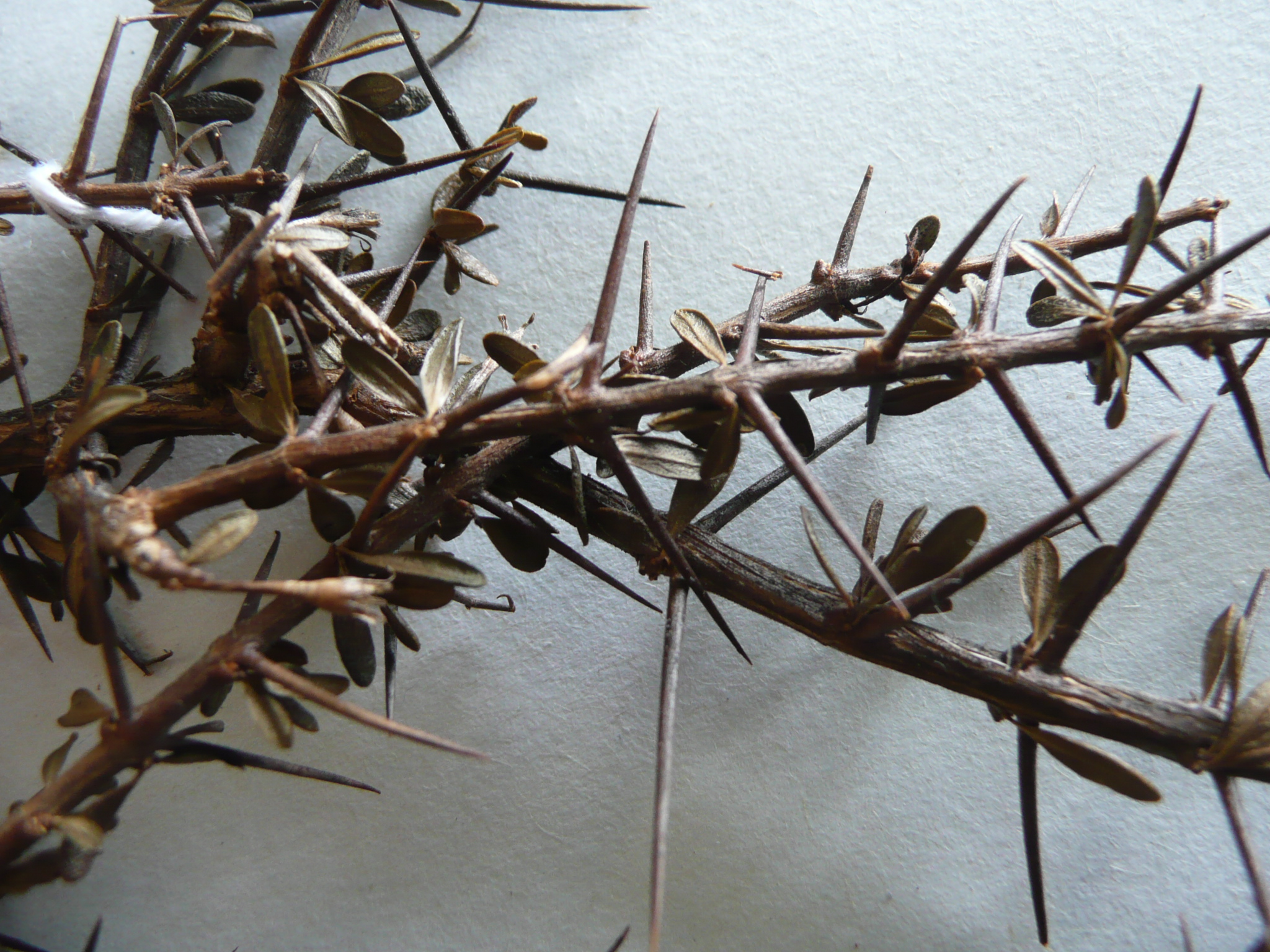 Fotografía de Anthacanthus nannophyllus